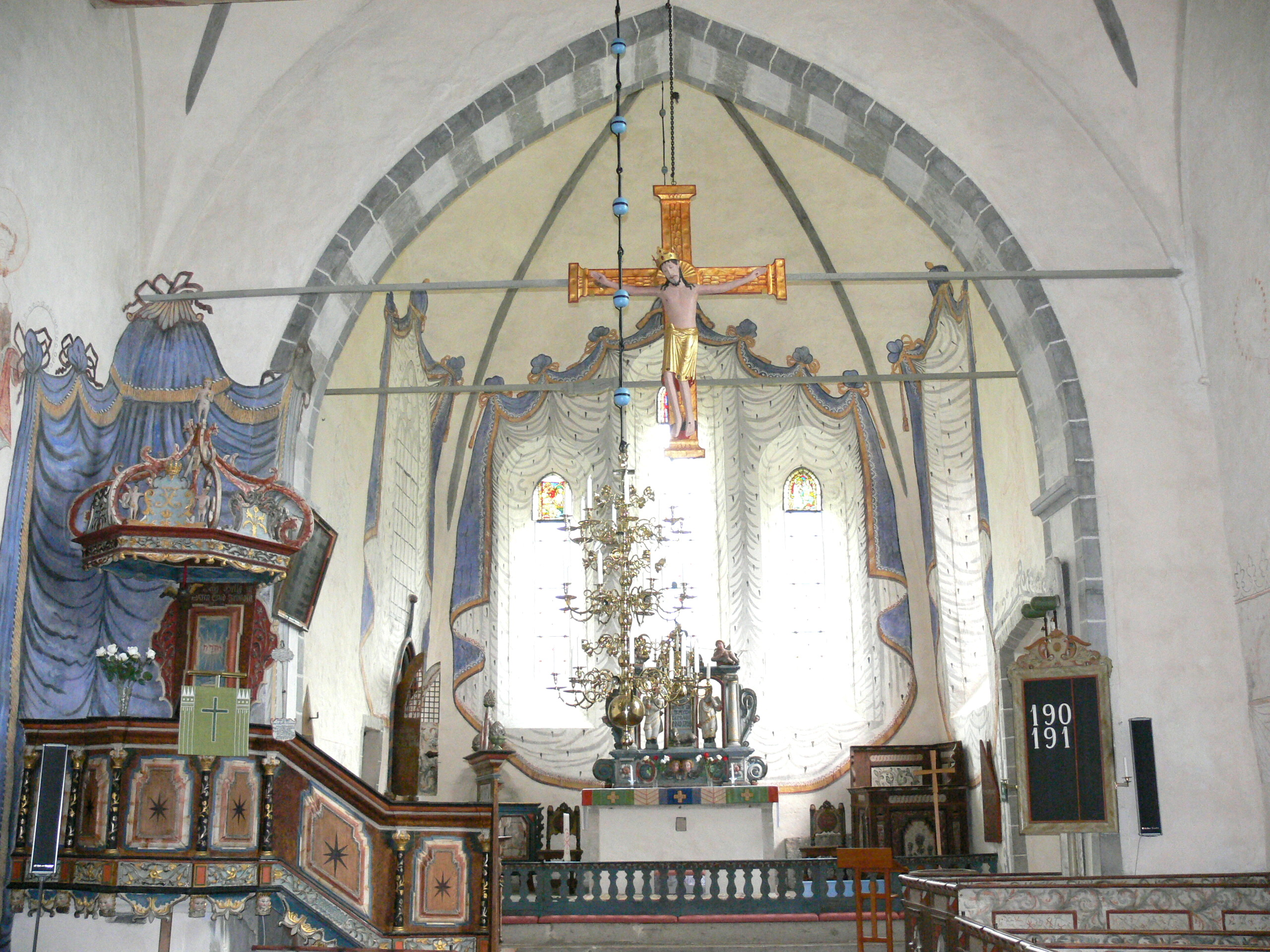 Ekeby kyrka auf Gotland. Altarraum mit Triumpfkreuz und Kanzel